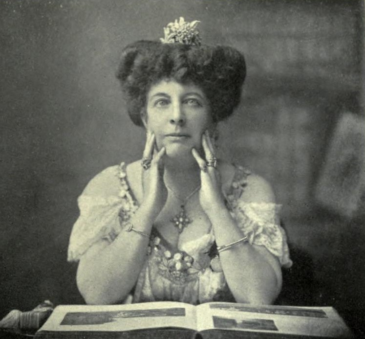 Eleonora Haggard 駐日ベルギー公使アルベール・ダネタン妻